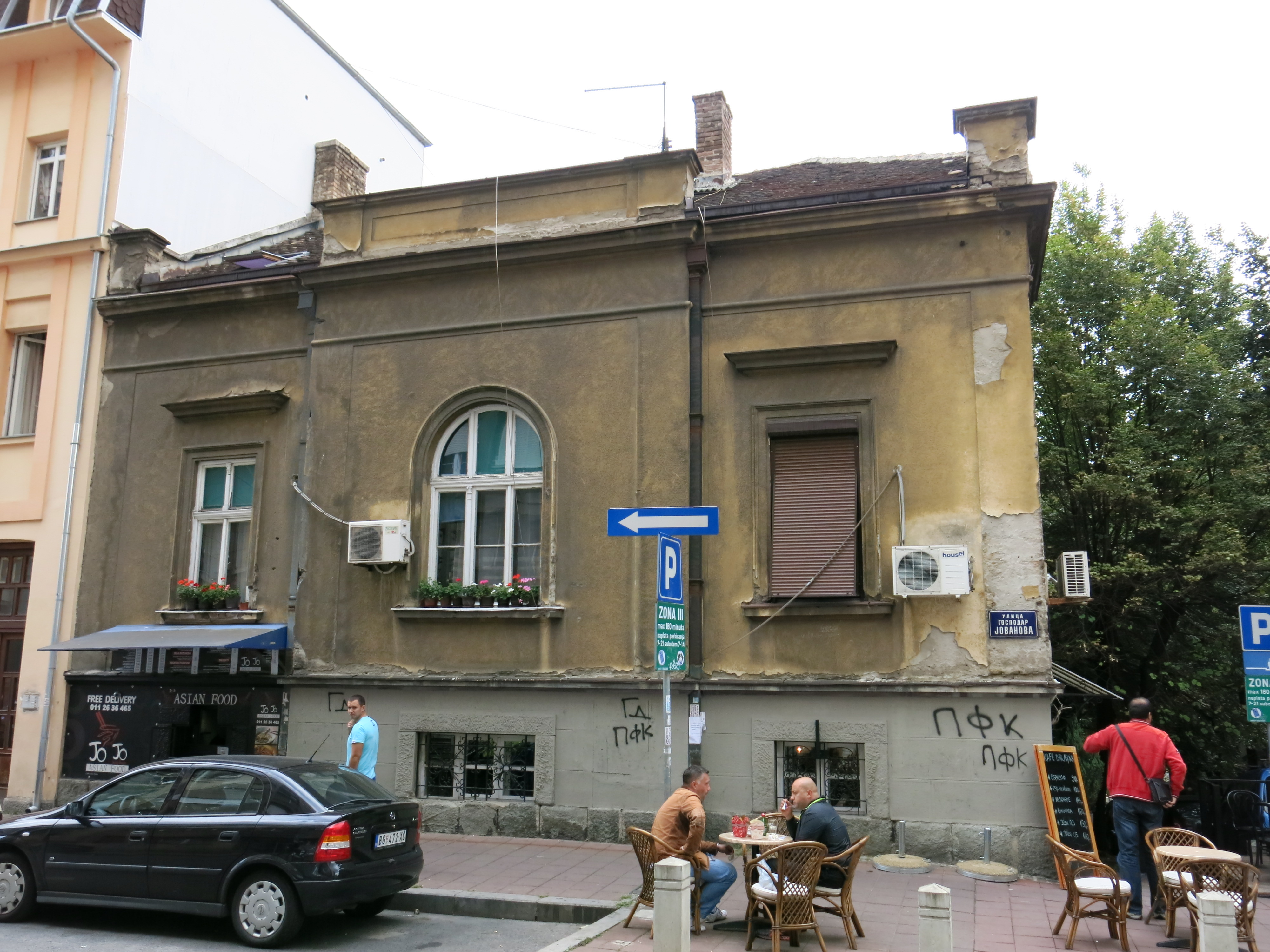 Кућа Бете и Ристе Вукановића